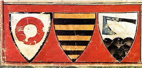 Wappen der Kuenringer, Zwettler Bärenhaut, 1310/20